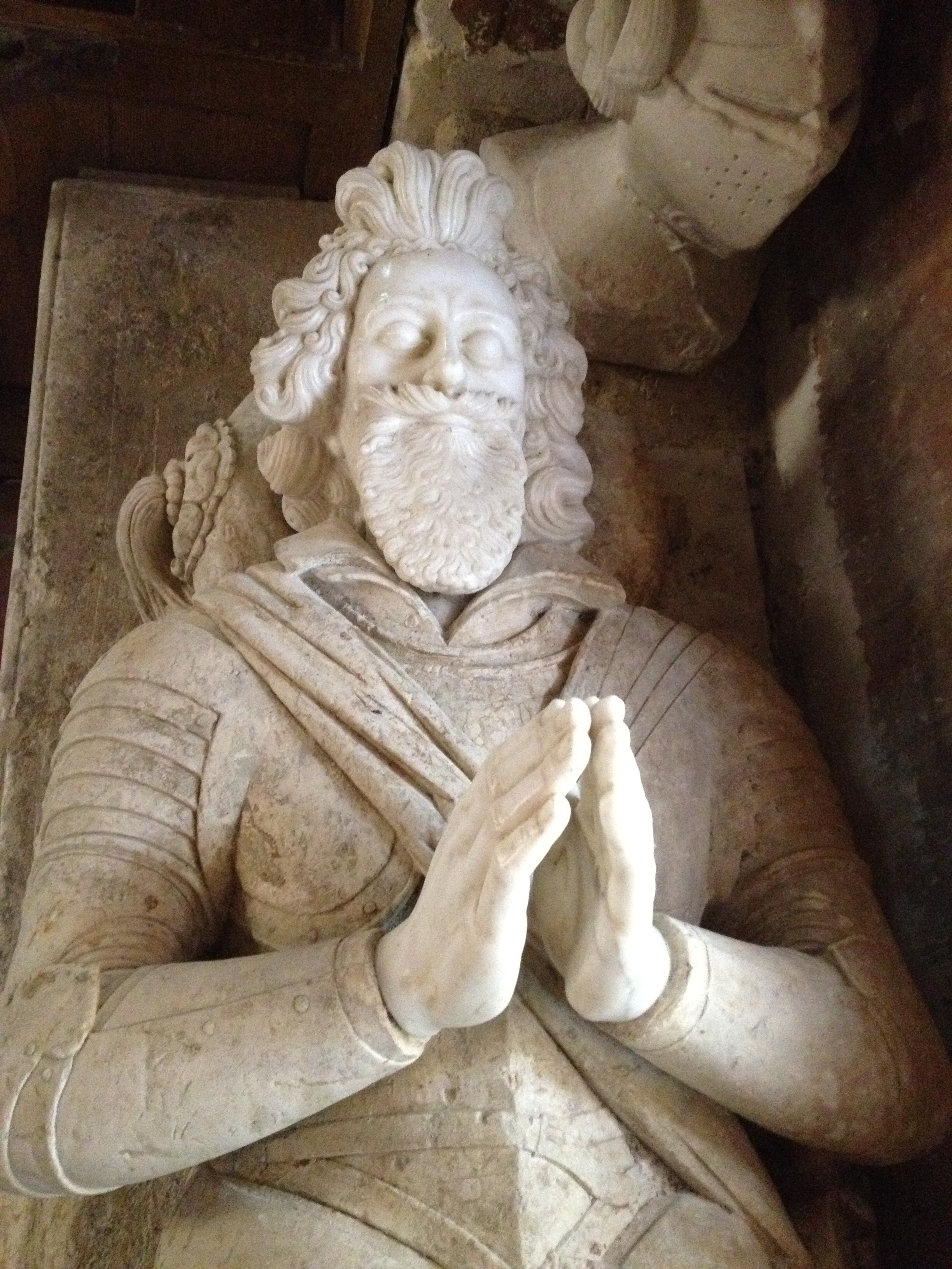 Détail gisant Guy d'Aché.